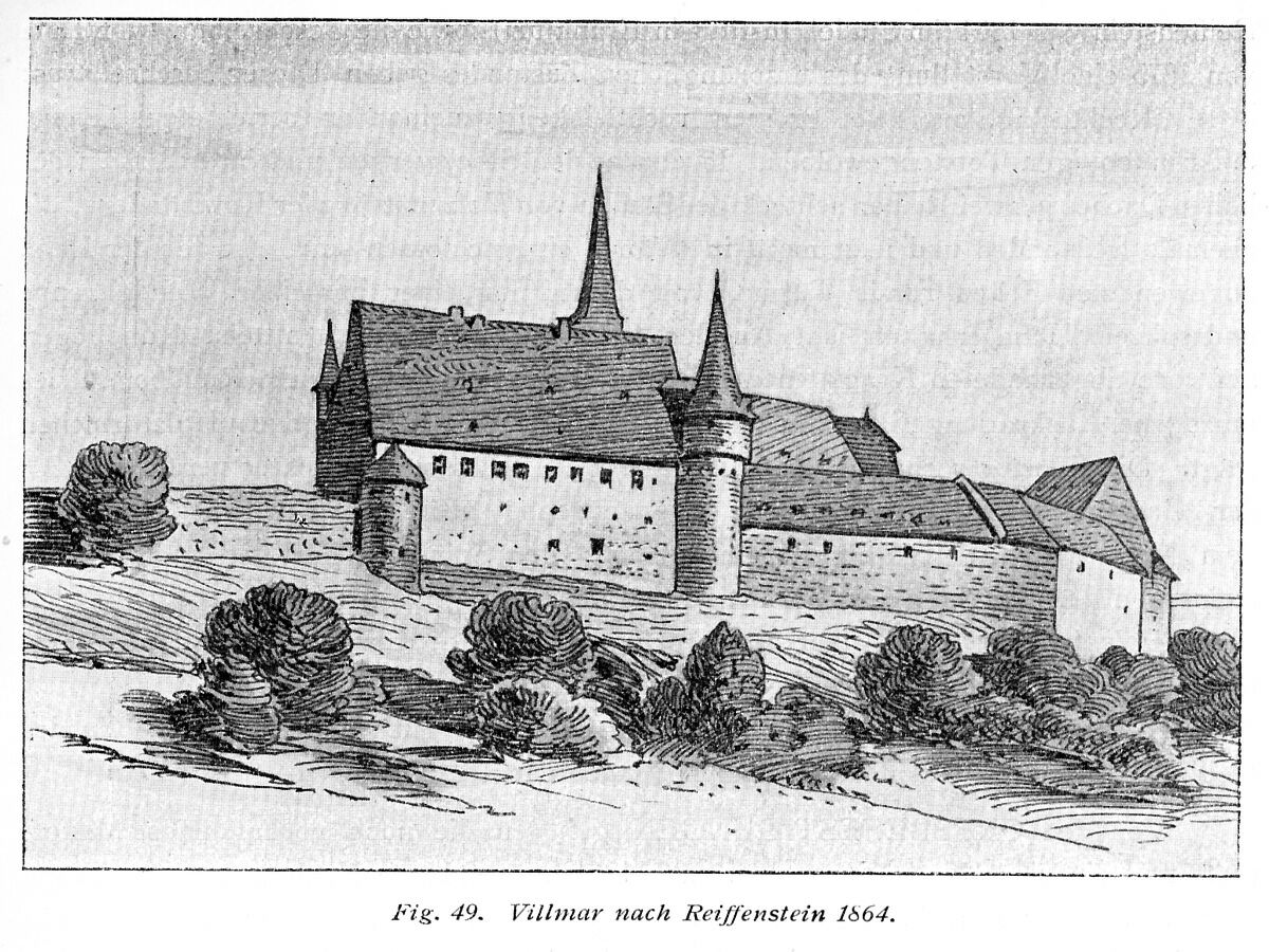 Ansicht von Villmar um 1864, kolorierte Zeichnung auf Papier